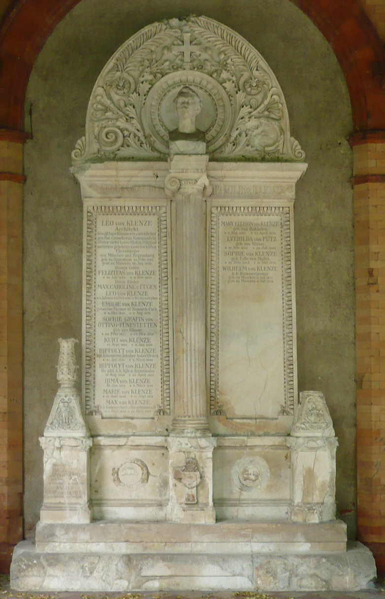 Grabstätte von Leo Klenze am Alten Sendlinger Friedhof in München